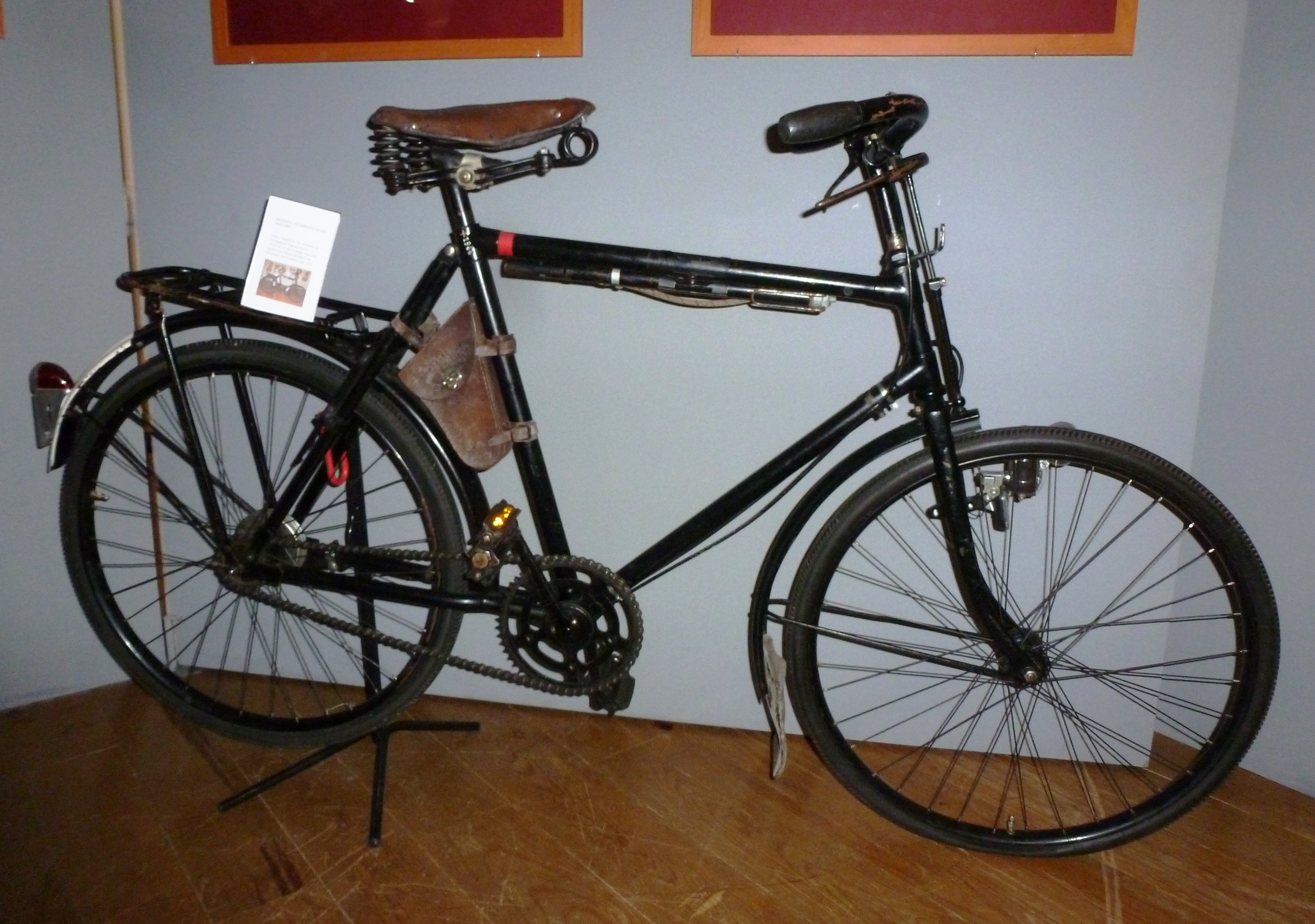 Schweizer Fahrrad aus dem Jahr 1940 im Museu do Ciclismo in Caldas da Rainha